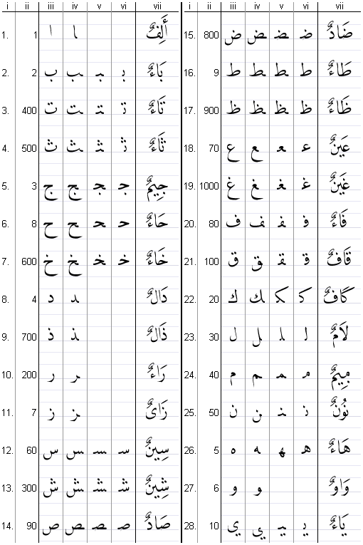 Arabisches Alphabet, selbst erstellt, Lizenzstatus: GNU-FDL Legende: i) Nummer – ii) Zahlwert – iii) isolierte Form – iv) nach rechts verbundene Form – v) beidseitig verbundene Form – vi) nach links verbundene Form – vii) Name